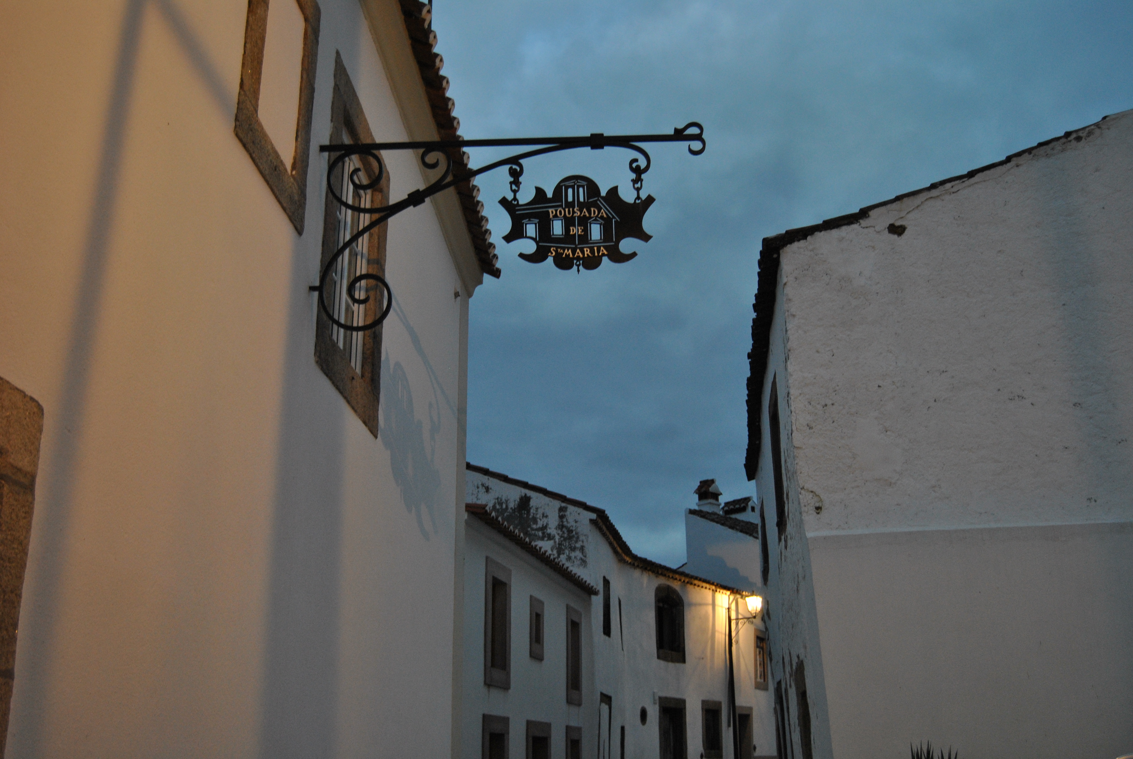 Marvão This file was uploaded for Wiki Loves Monuments in Portugal with the unique identifier 97017337.